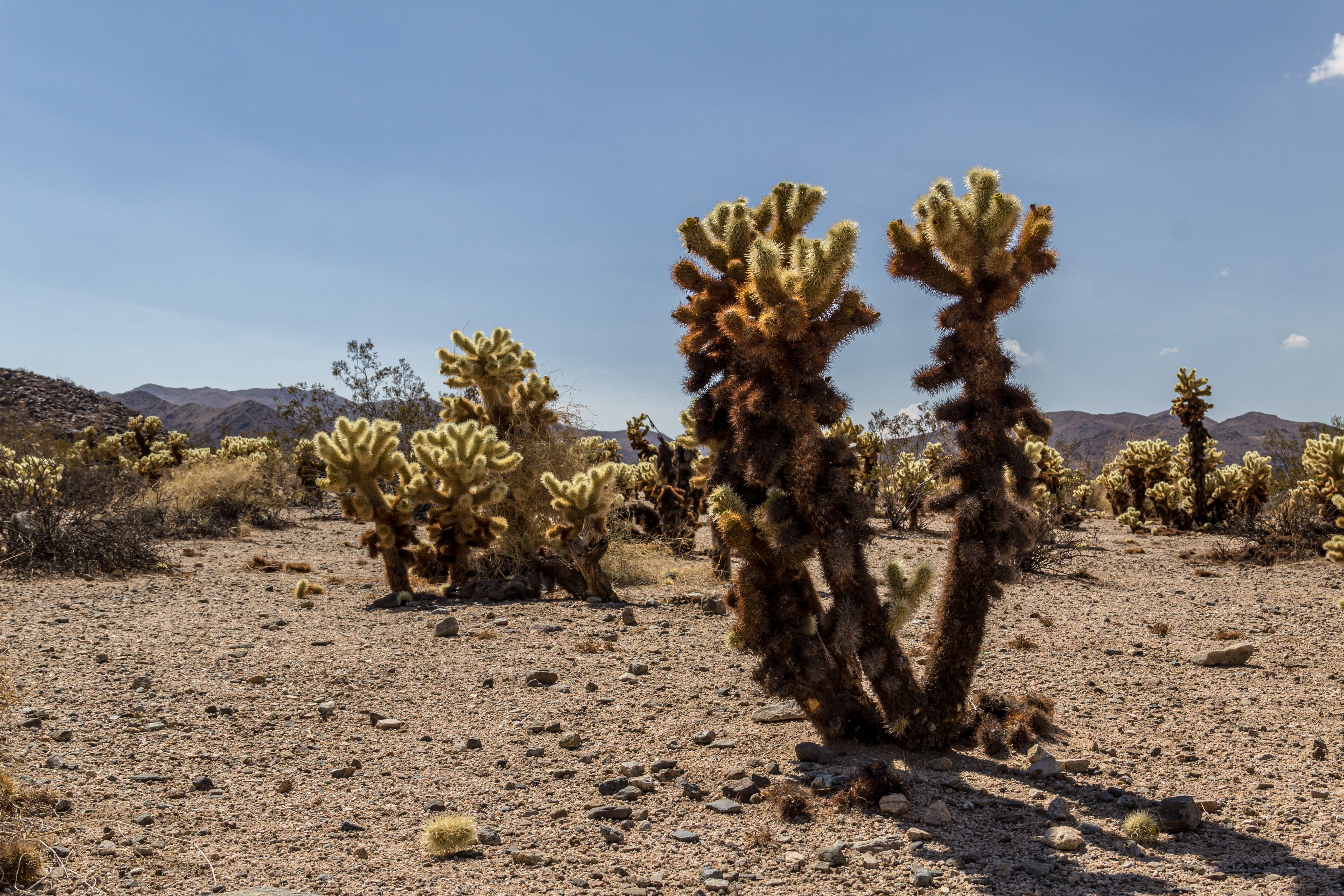 Joshua Tree National Park, Kalifornien, USA